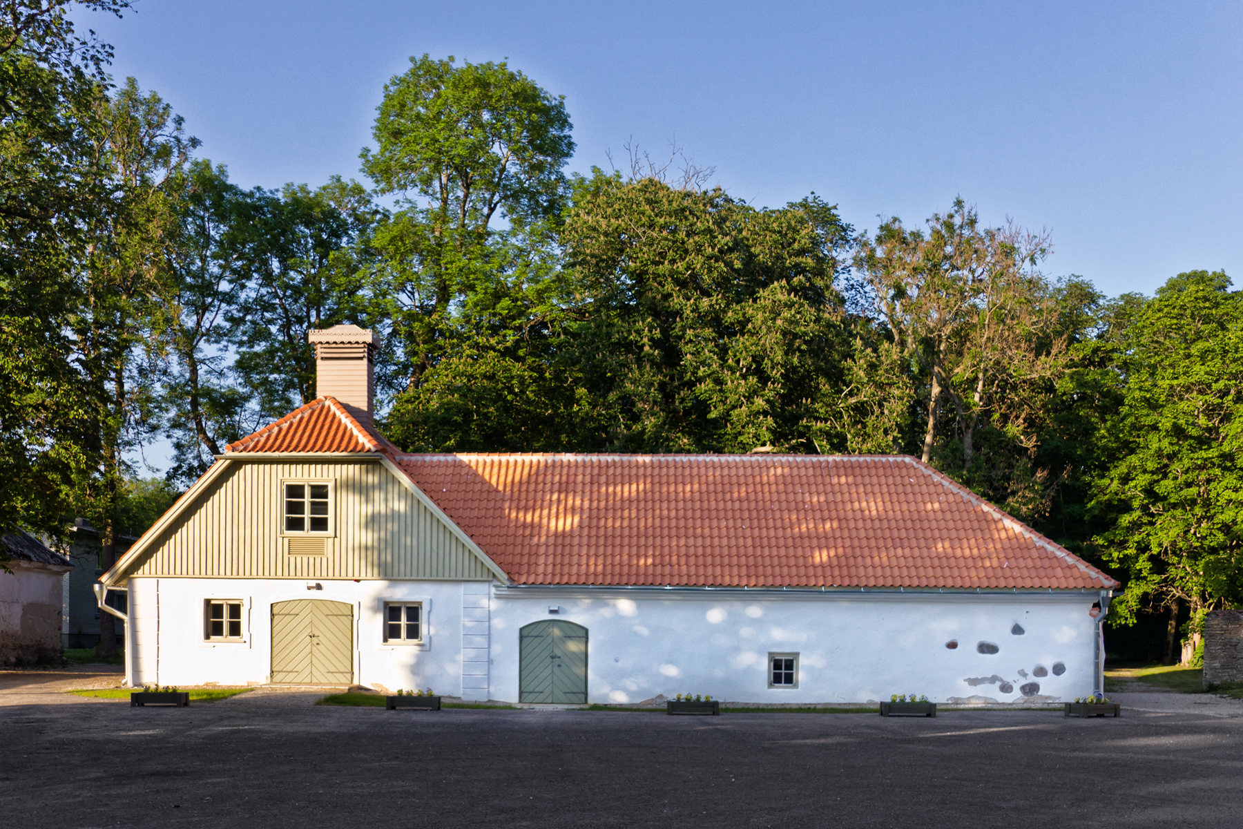 Suuremõisa mõisa teenijatemaja